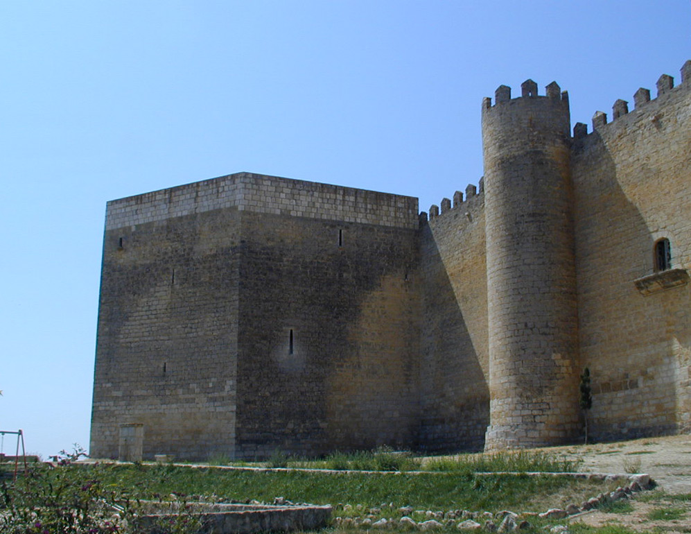 Montealegre de Campos, Valladolid, España. Castillo.